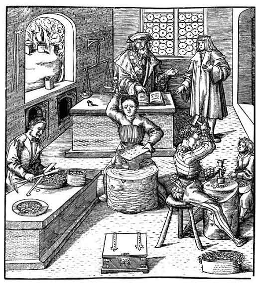 Mittelalterliche Werkstatt, vermutlich Deutschland